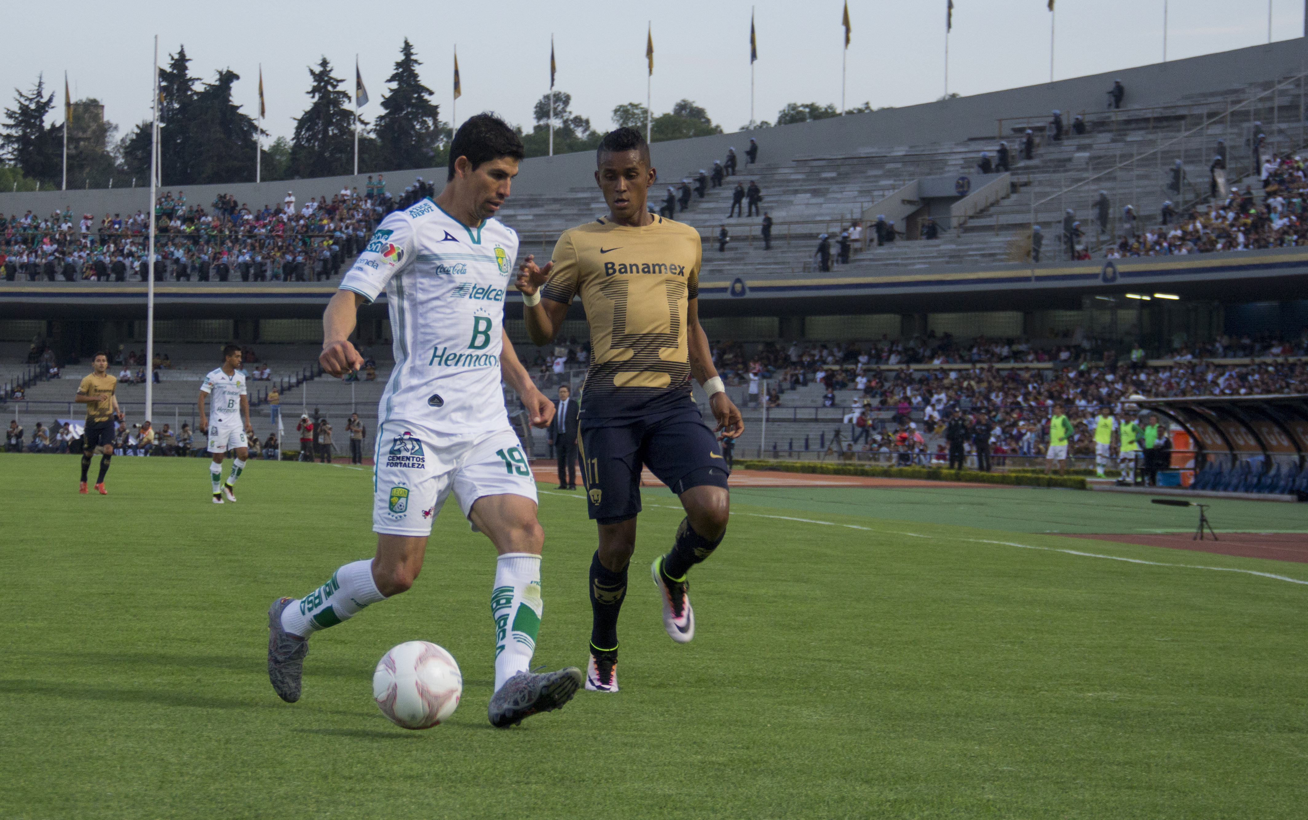 Pumas vs León